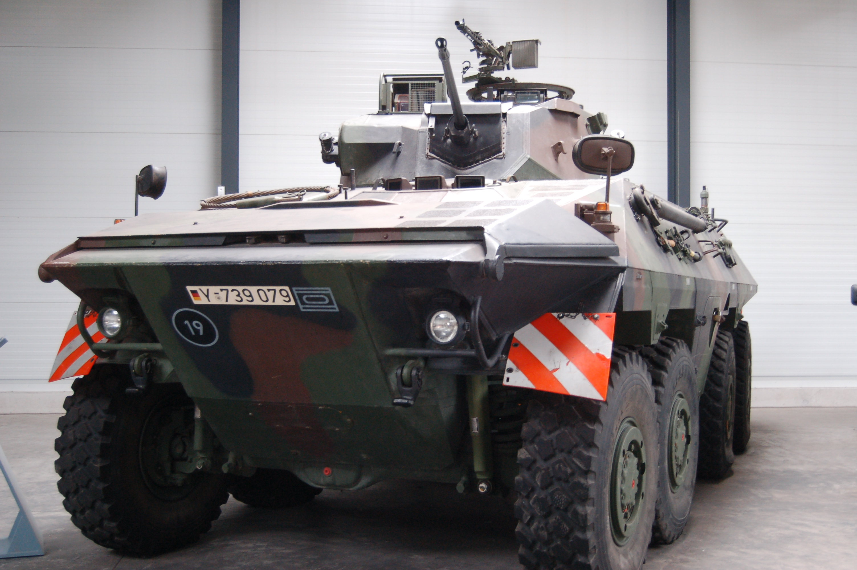 Spähpanzer 2 "Luchs A2" Besatzung: 4 Soldaten Gewicht: 19,9 Tonnen Motorleistung: 286 kW (389 PS) Bewaffnung: 1 Maschinenkanone 20 mm L/85, Kaliber: 20 mm x 139, sowie 1 Fla-MG 7,62 mm Besonderheiten: Nachtkampffähig und schwimmfähig Baujahr: 1975 - 1977 Stückzahl: 408